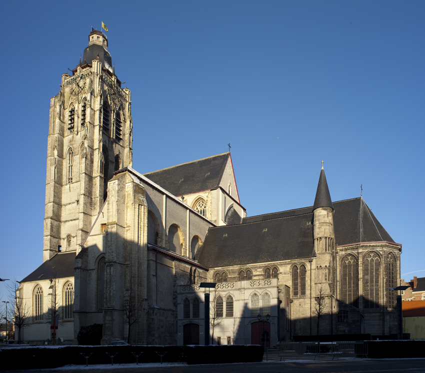 Sint-Walburgakerk, Oudenaarde, Belgium